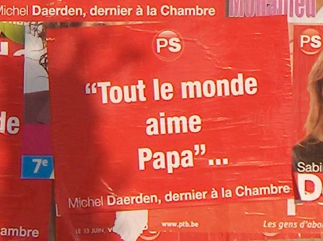 Wahlslogan von Michel Daerden zu den Parlamentswahlen für das belgische Parlement am 13. Juni 2010. Wahlplakate am place du Roi Albert zu Waremme (Provinz Lüttich, Belgien): als einer der beliebtesten Politiker in seinem Wahlkreis nennt er sich "papa".